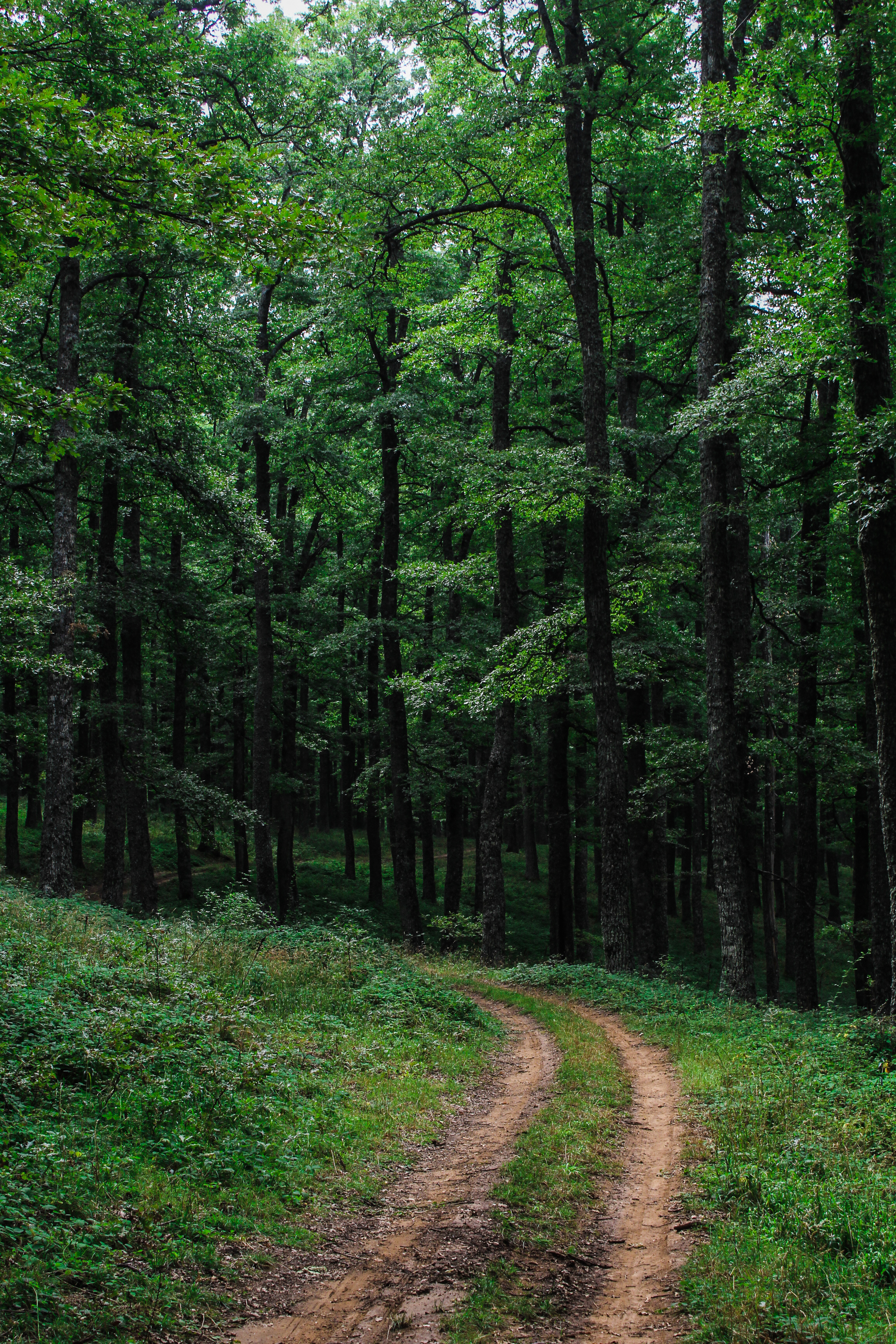 foresta Gallipoli Cognato This is a photo of a monument which is part of cultural heritage of Italy.